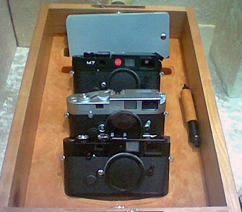 Leica M cameras